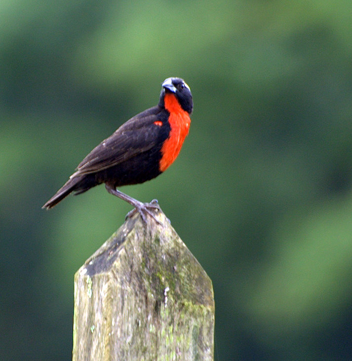 Margem do rio Ribeira de Iguape próximo à cidade de Registro